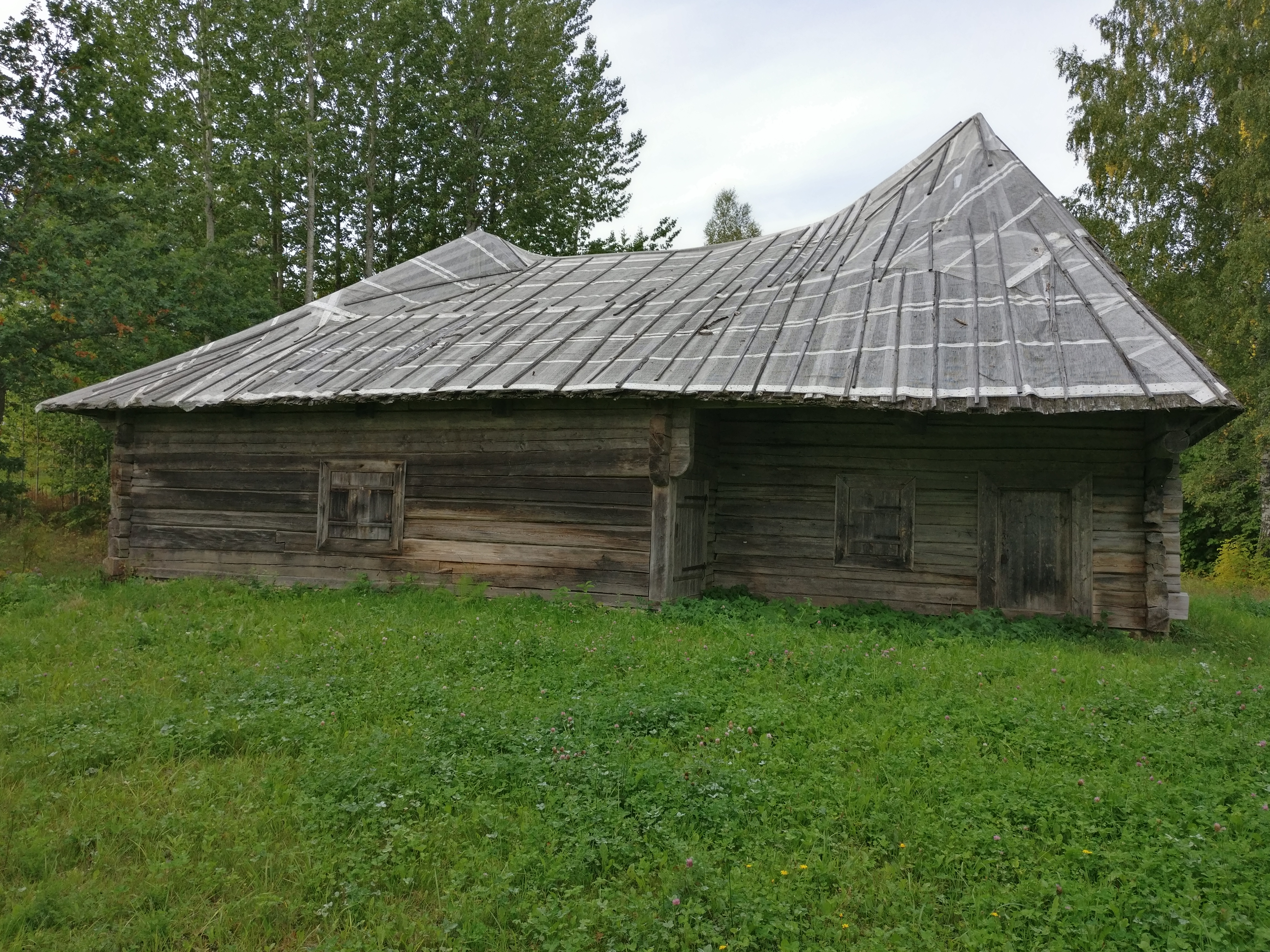 Saiešanas nams "Cepļos", Vecpiebalgas pagasts